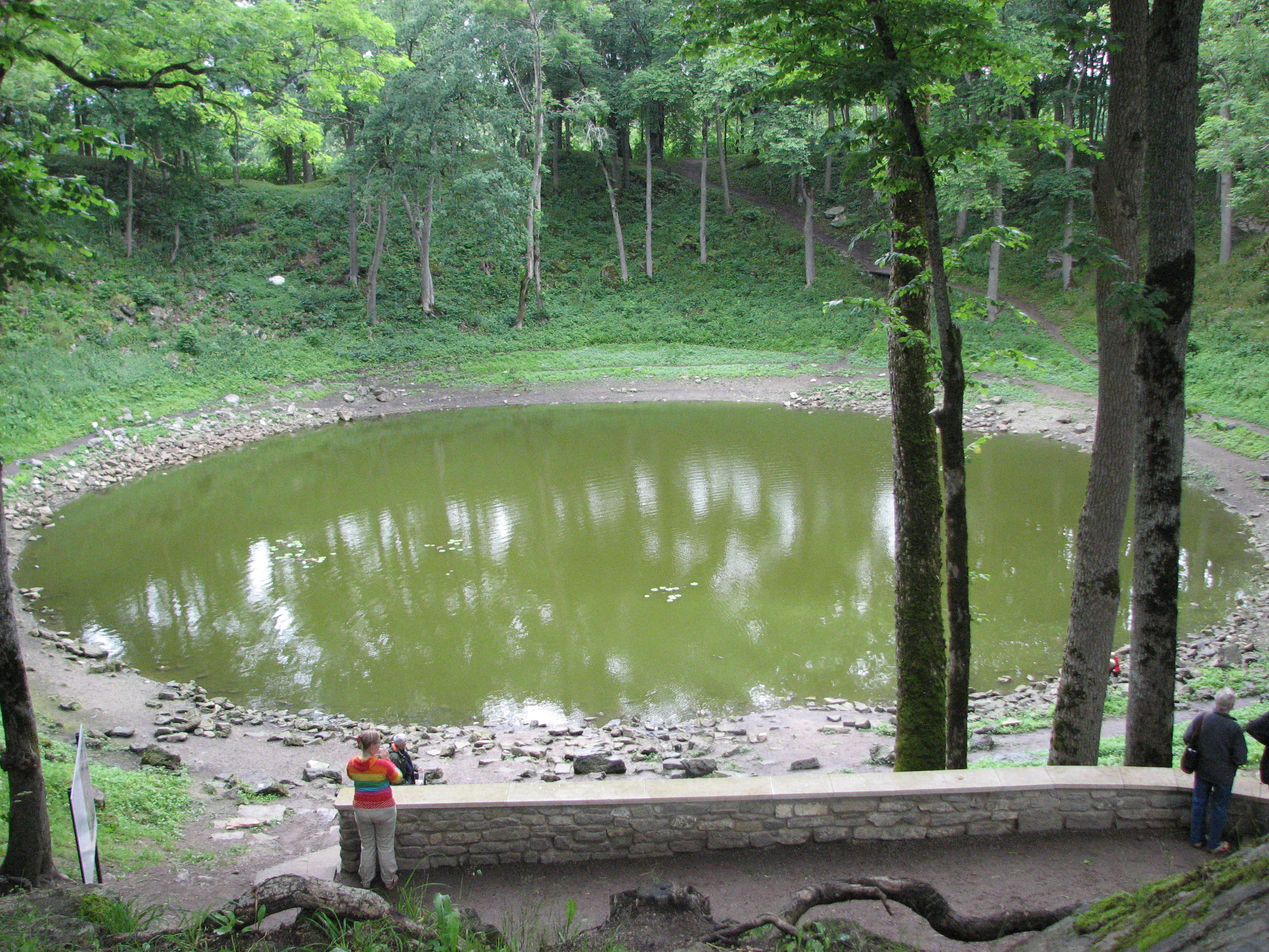 Kaali meteorite crater. Saaremaa, Estonia